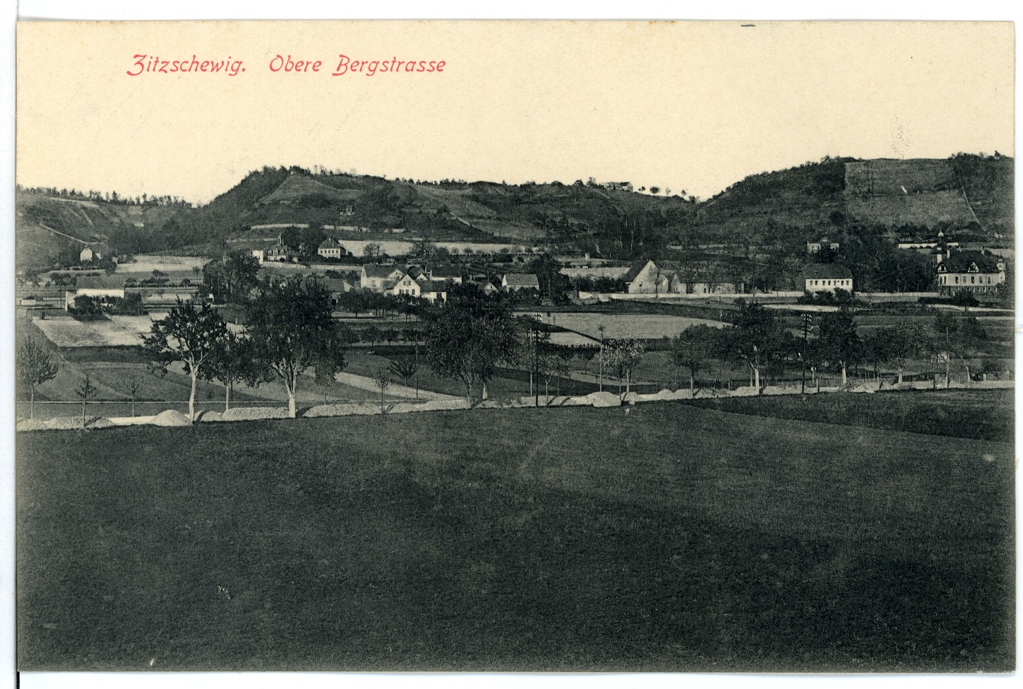 Radebeul; Obere Bergstraße - Zitzschewig This postcard is from publisher Brück & Sohn in Meißen ( postcard has a unique number 15677 and is available in a higher resolution at the publisher. This images was uploaded in a cooperation project between Wikipedians and the publisher.